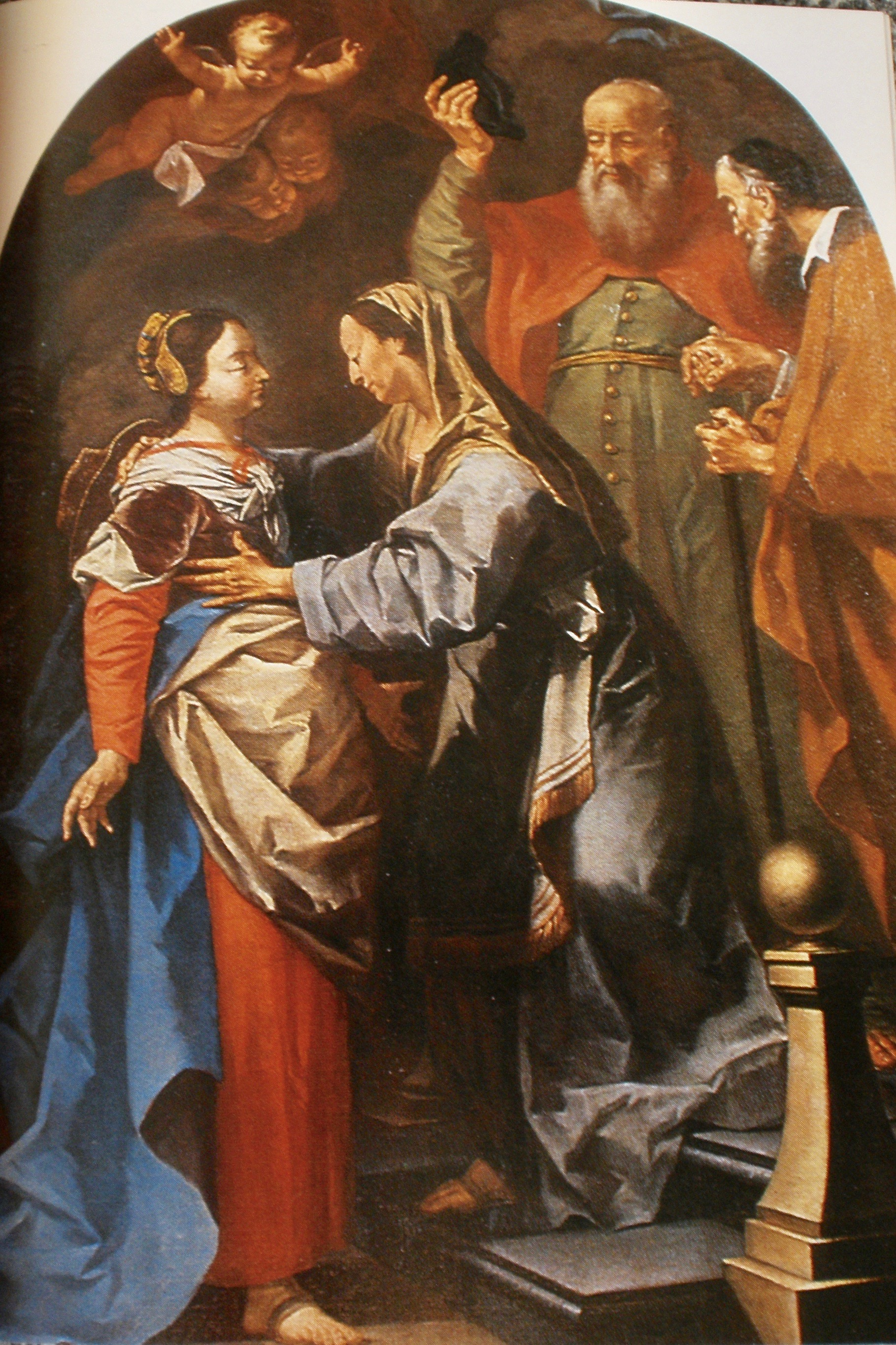 Hochaltarbild "Mariä Heimsuchung" in der Gmundner Kapuzinerkirche; 1753 gemalt von Philipp Haller.